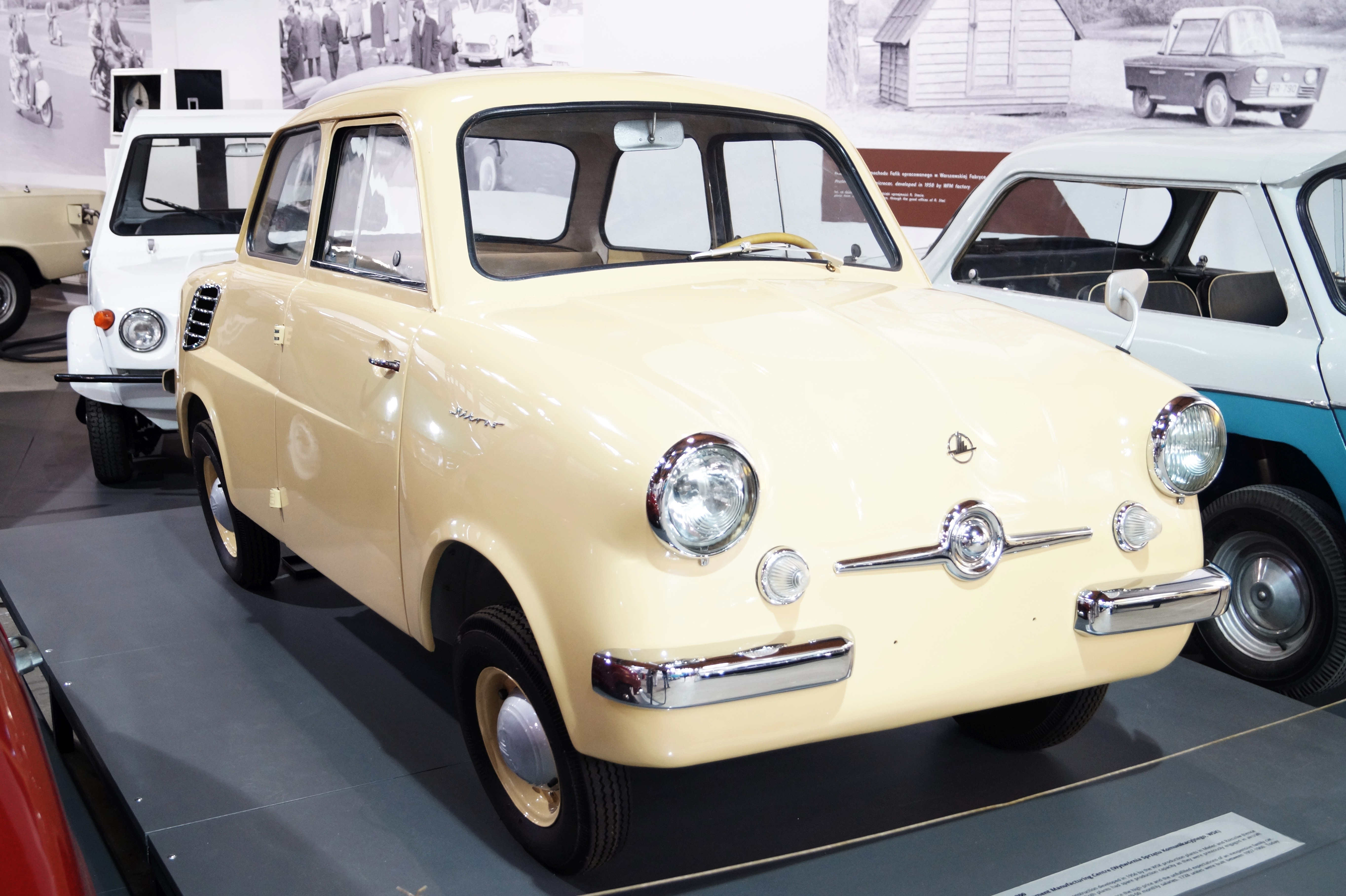 This photo was taken during Automotive Wikiexpedition 2016 set up by Wikimedia Polska Association.You can see all photographs in category Wikiekspedycja motoryzacyjna 2016. English | polski | +/− WSK Mikrus MR-300 w Muzeum Inżynierii Miejskiej w Krakowie